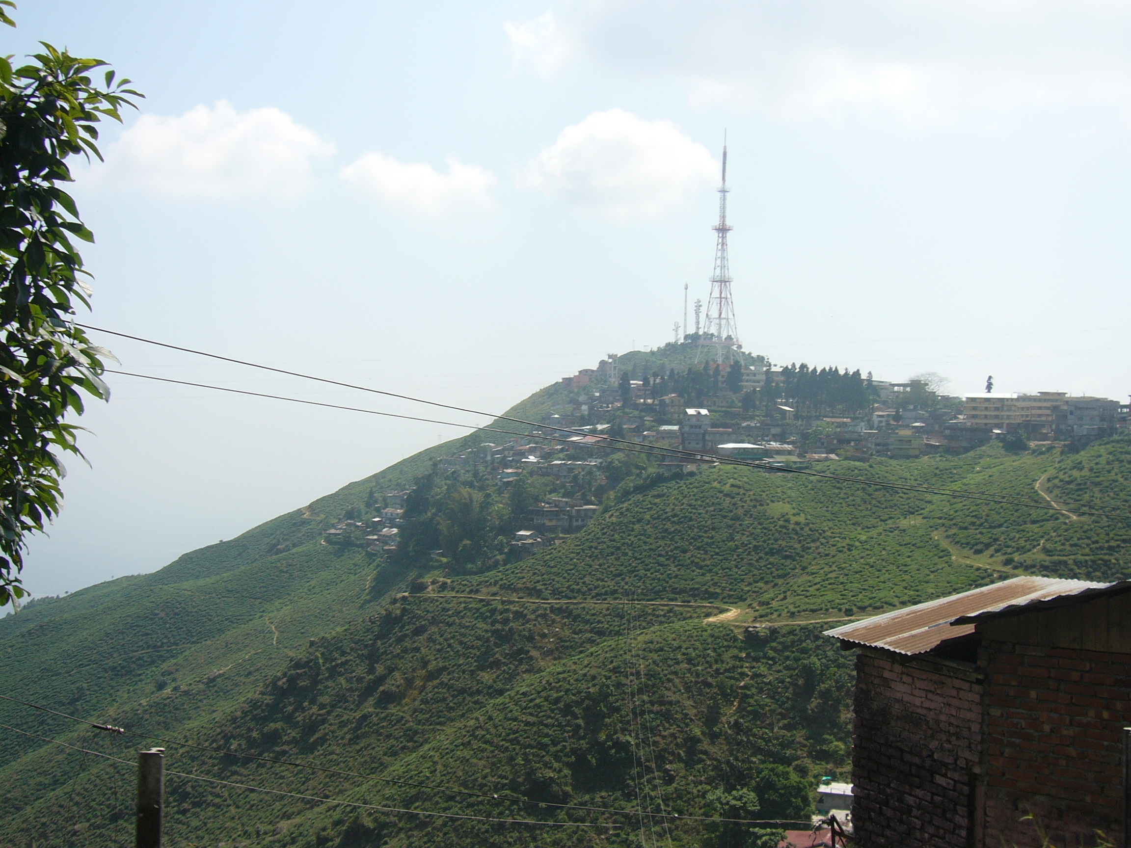 Kurseong Darjeeling West Bengal India